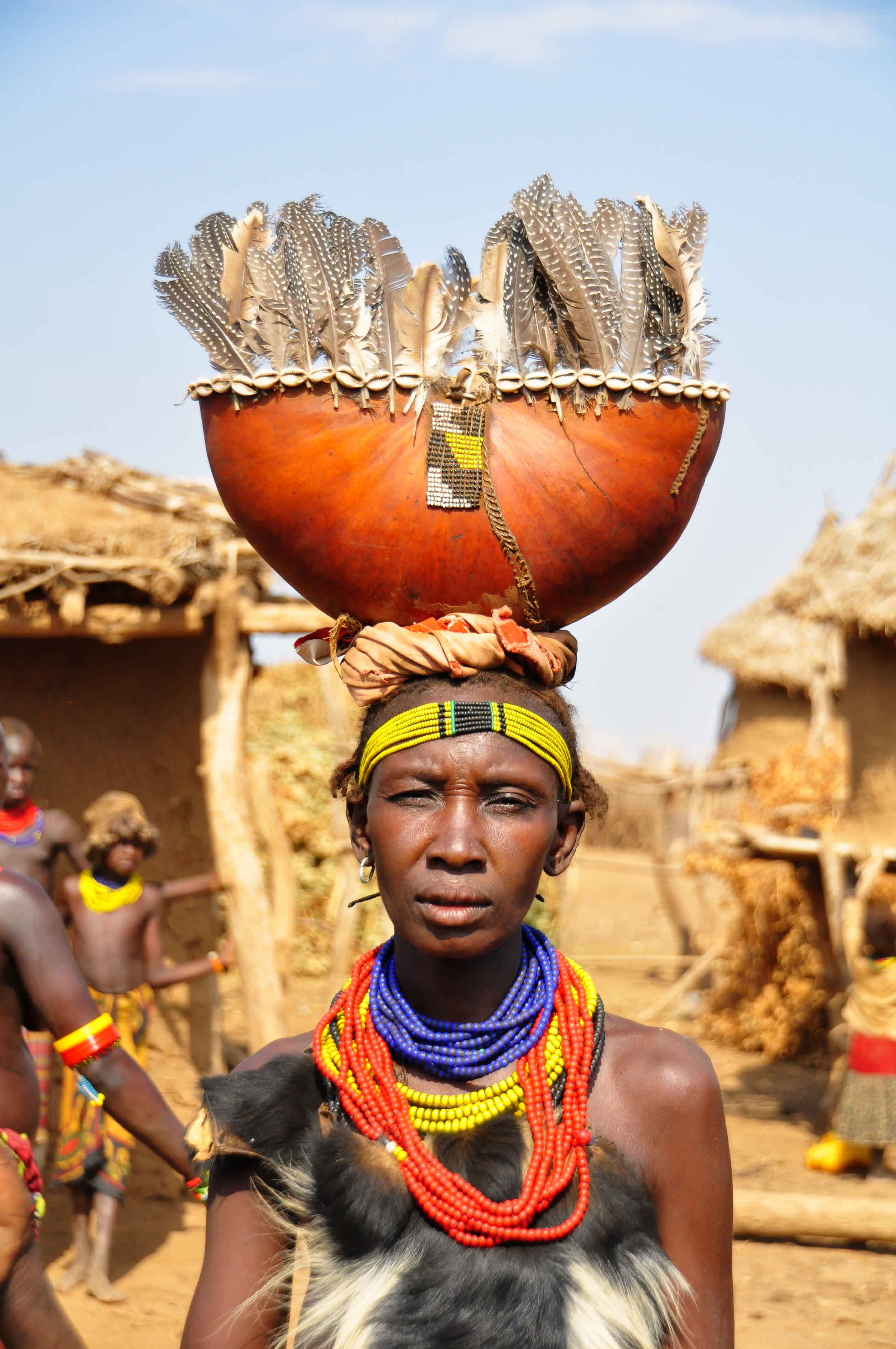 Dassanech Woman, First Wife